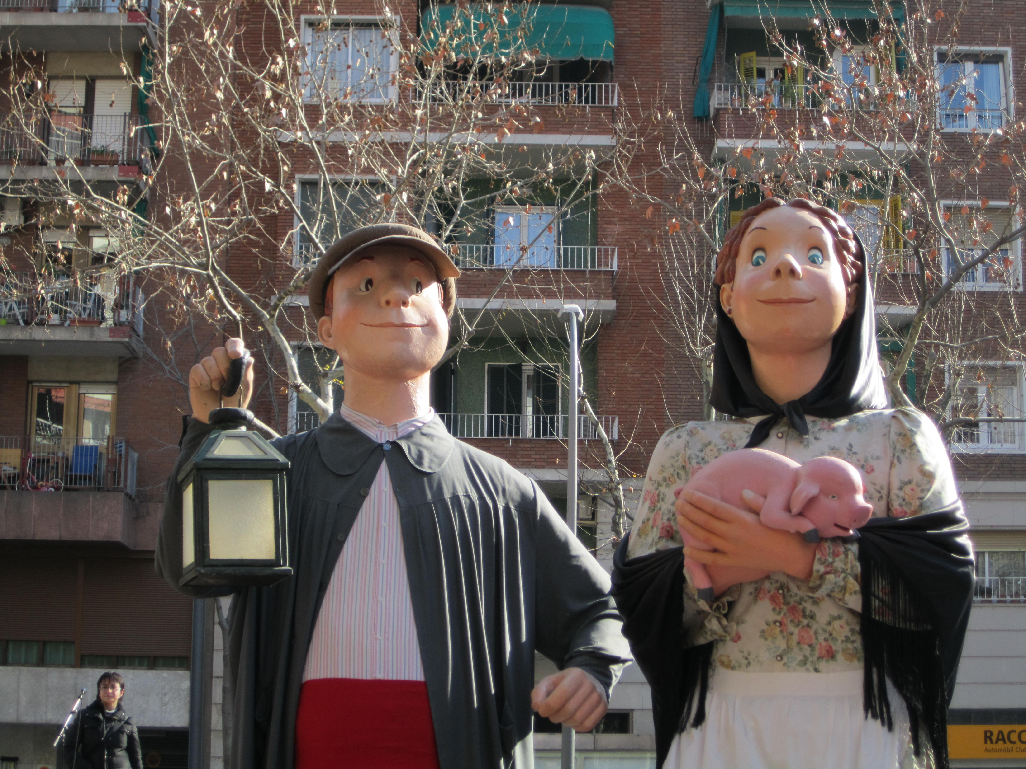 En Tonet i la Rita, Gegants del Barri de Sant Antoni de Barcelona